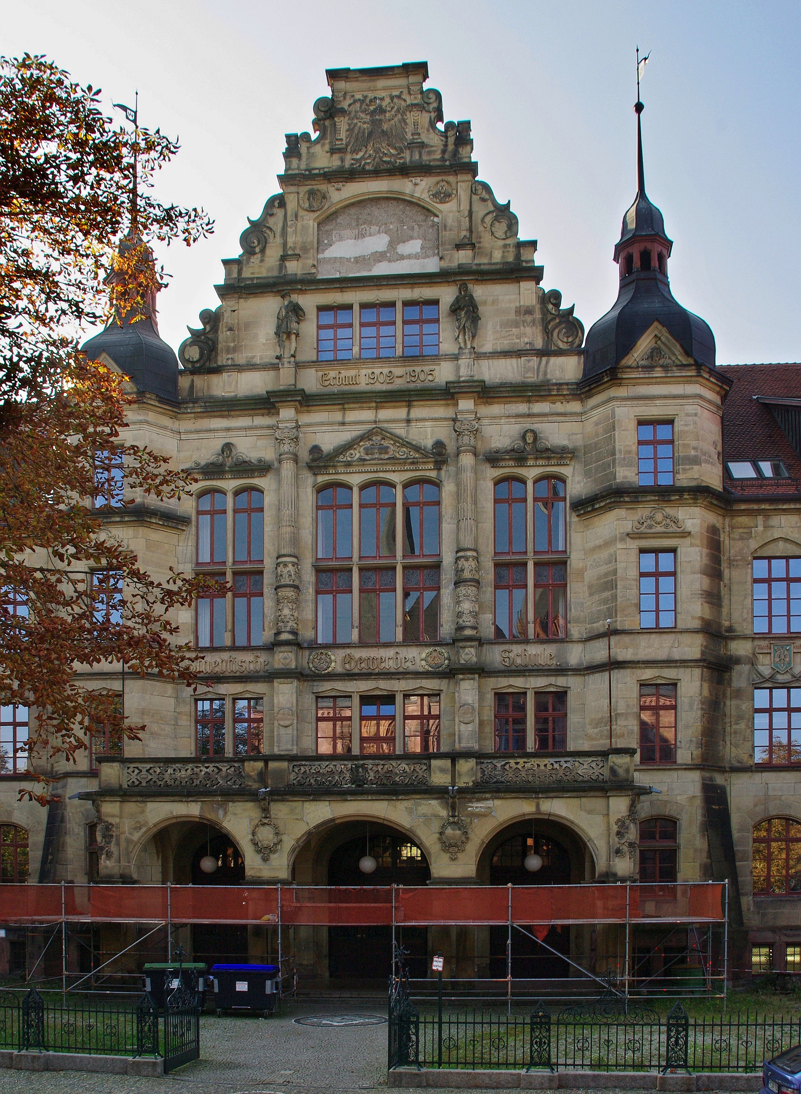 Haupteingang der Gertrud Luckner Schule